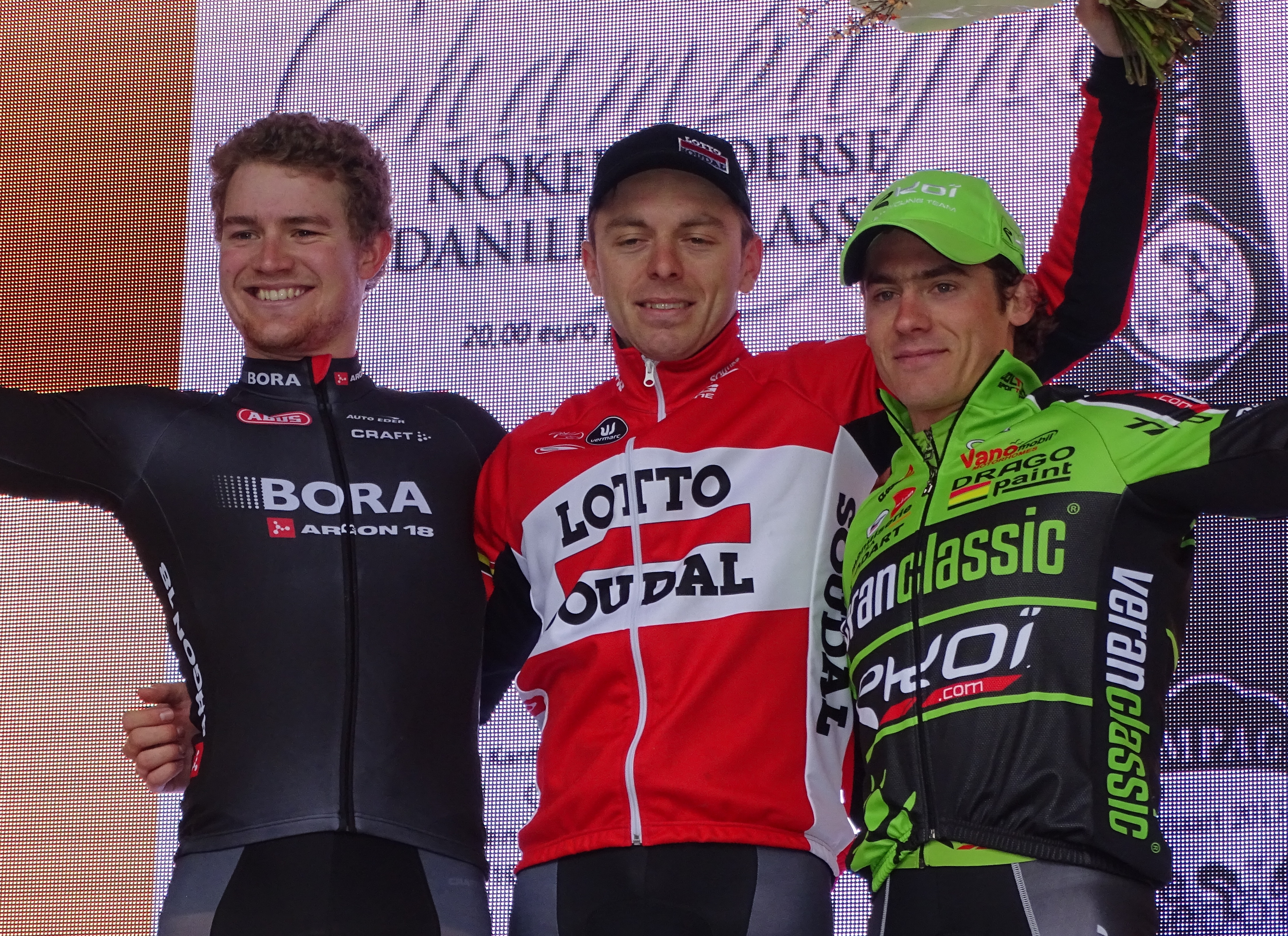 Reportage réalisé le mercredi 18 mars à l'occasion de l'arrivée de la Nokere Koerse 2015 à Nokere (Kruishoutem), Belgique.